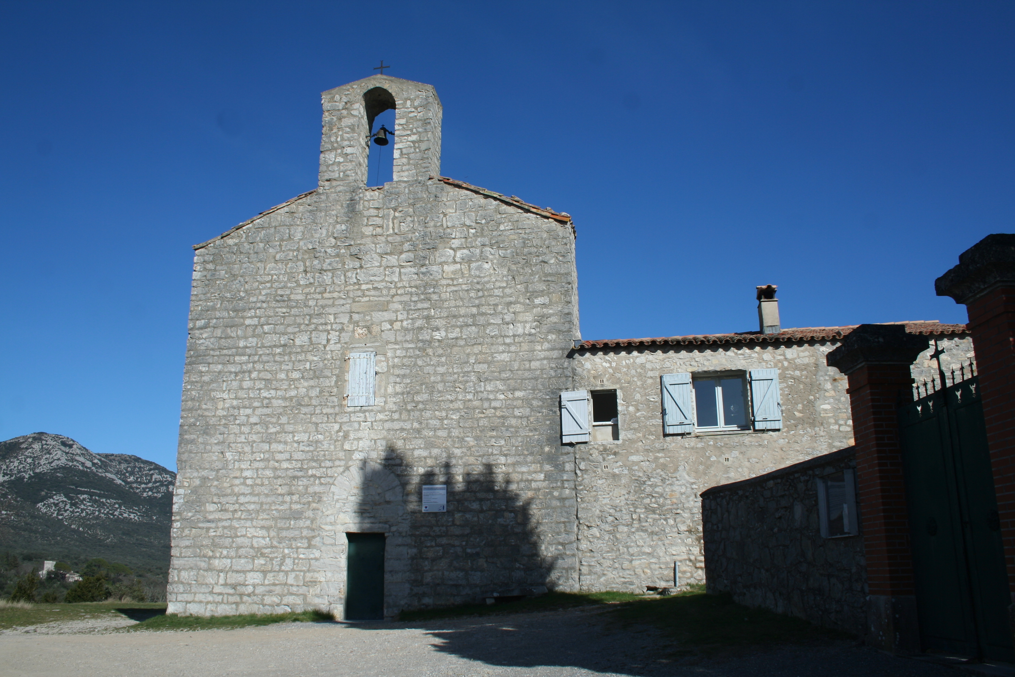 Moulès-et-Baucels (Hérault) - façade ouest de l'église de Saint-Jean-Baptiste de Moulès-et-Baucels (dite l'églisette)